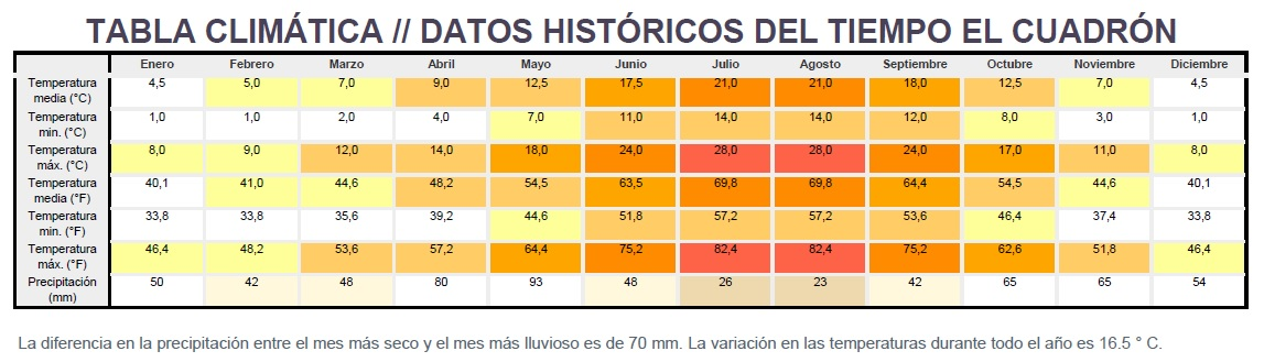 Tabla climatica de El Cuadron